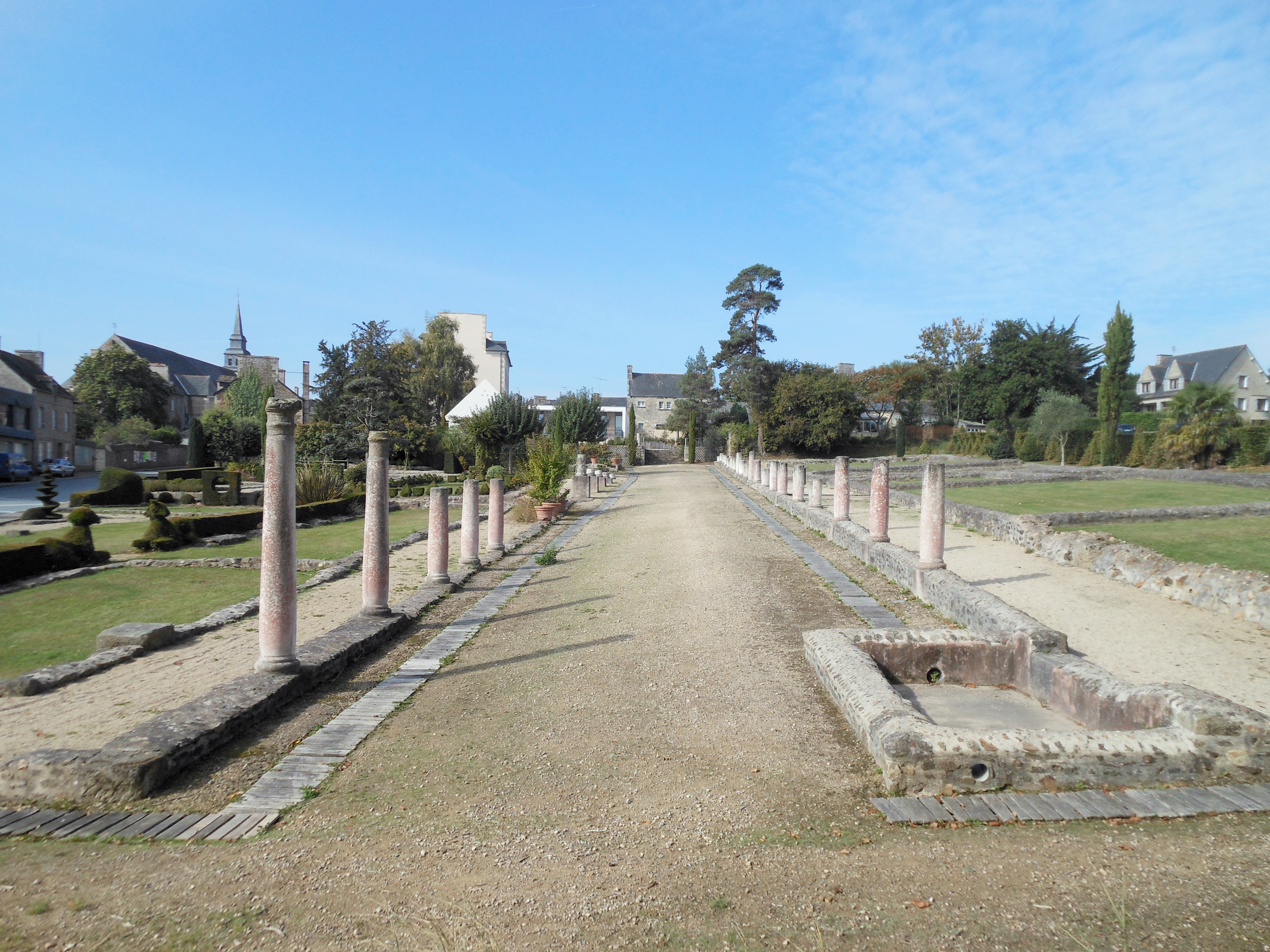 À Corseul (22), les vestiges gallo-romains du quartier commercial de Monterfil, appelé aussi le jardin des Antiques.